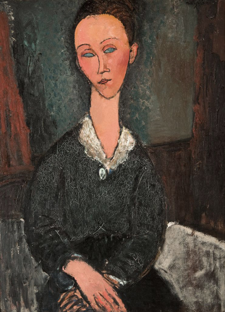 Depicted person: Lunia Czekowska